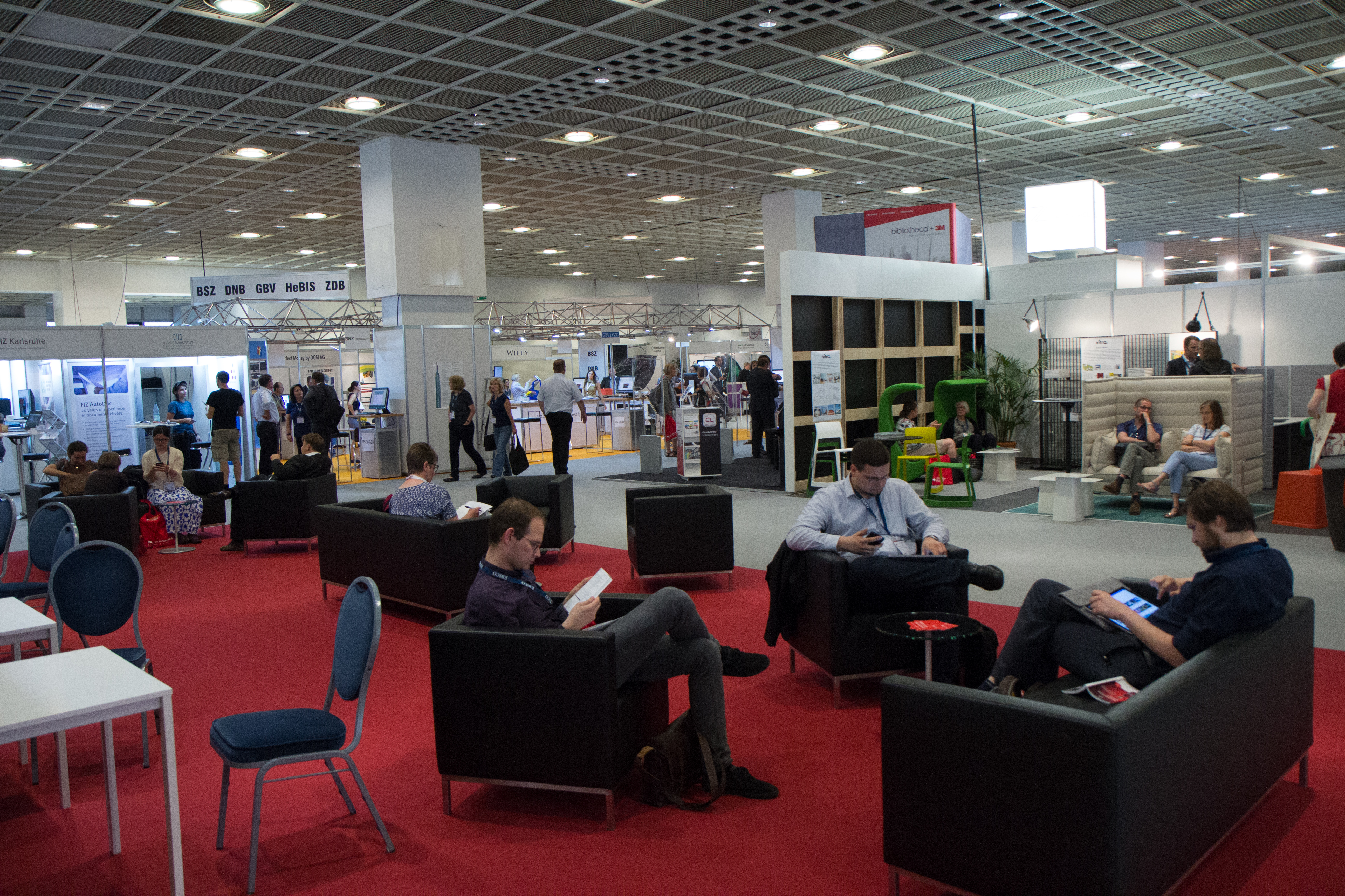 106. Deutscher Bibliothekartag in Frankfurt/Main